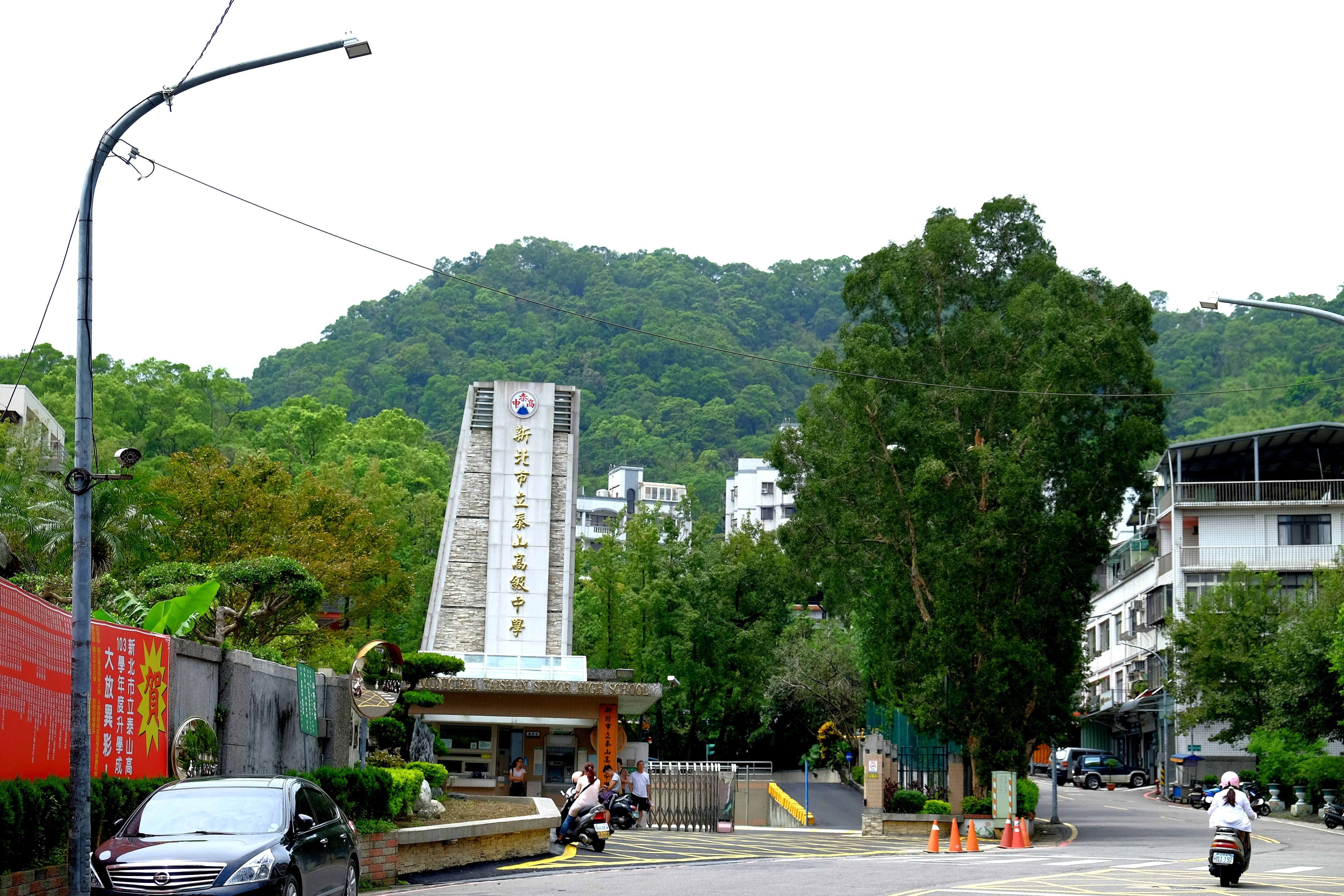 中文（台灣）: 新北市立泰山高級中學大門